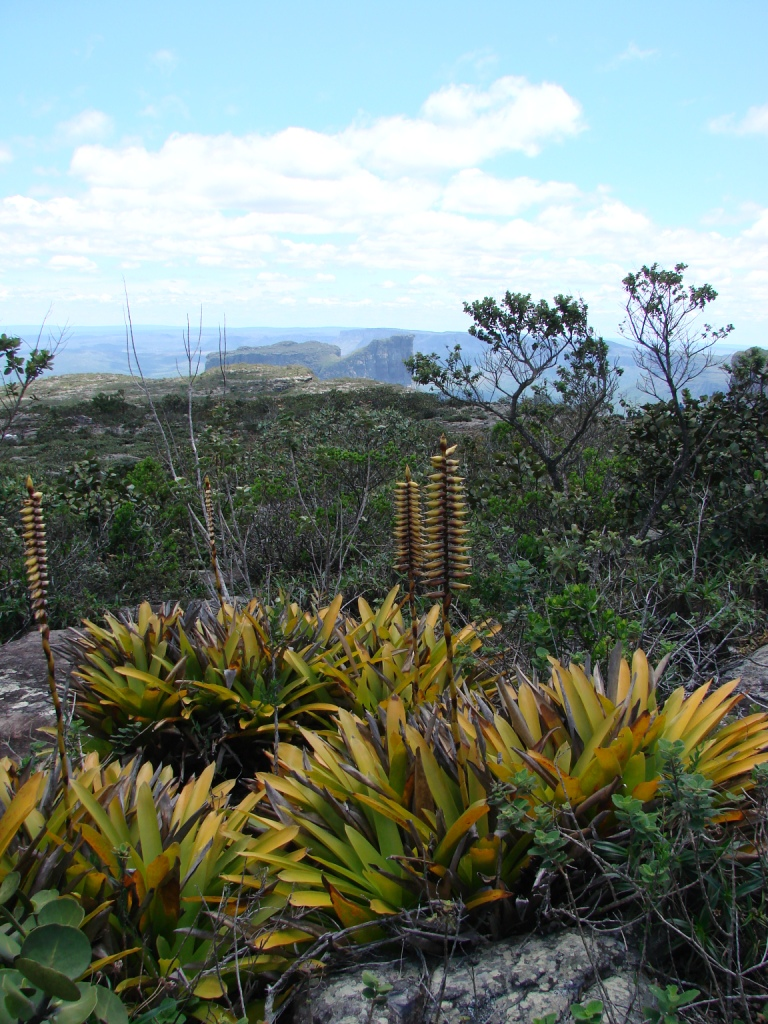 Vriesea atra - BROMELIACEAE - Parque Natural Municipal Morro do Pai Inácio - Palmeiras - Bahia - Brasil.